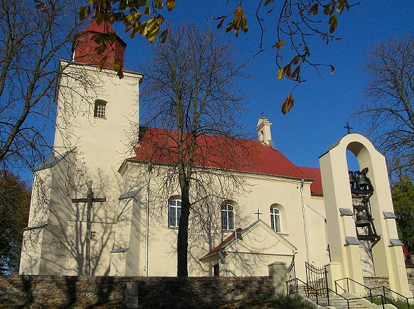 Rybitwy - kościół parafialny p.w. Wszystkich Świętych, 1613, XIX w. (zabytek nr A/557 z 29.12.1971 i kl.V-Oa/37/56 z 26.05.1956) Autor: Maciej Dembiniok 2005